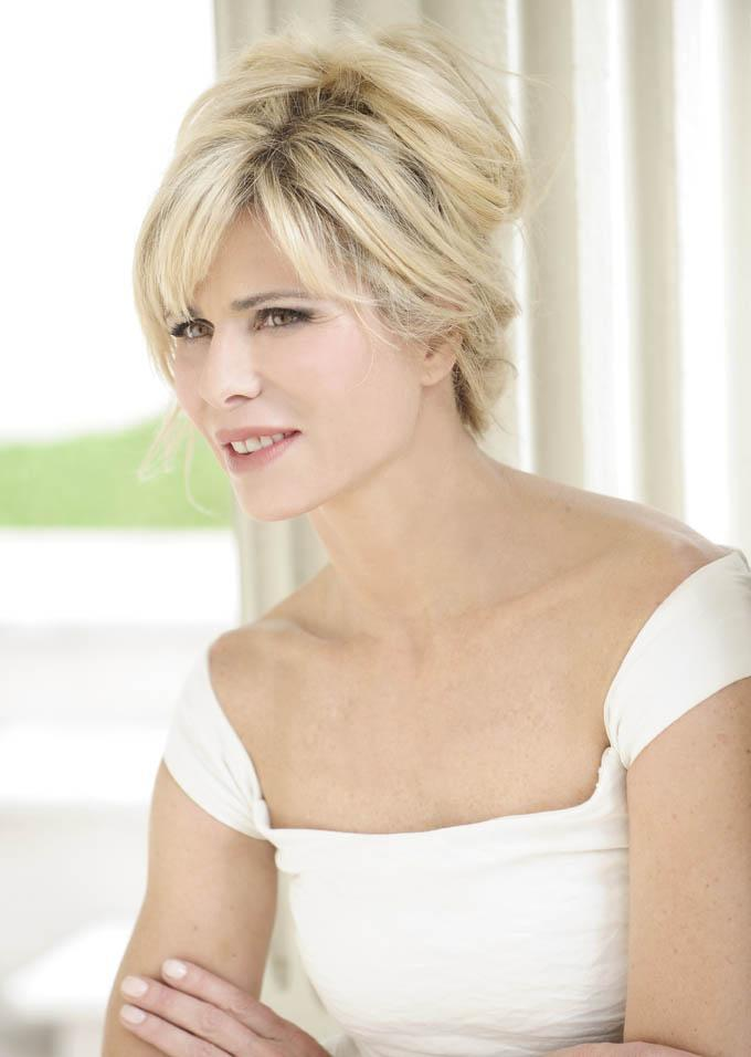 Retrato de Karina Rabolini